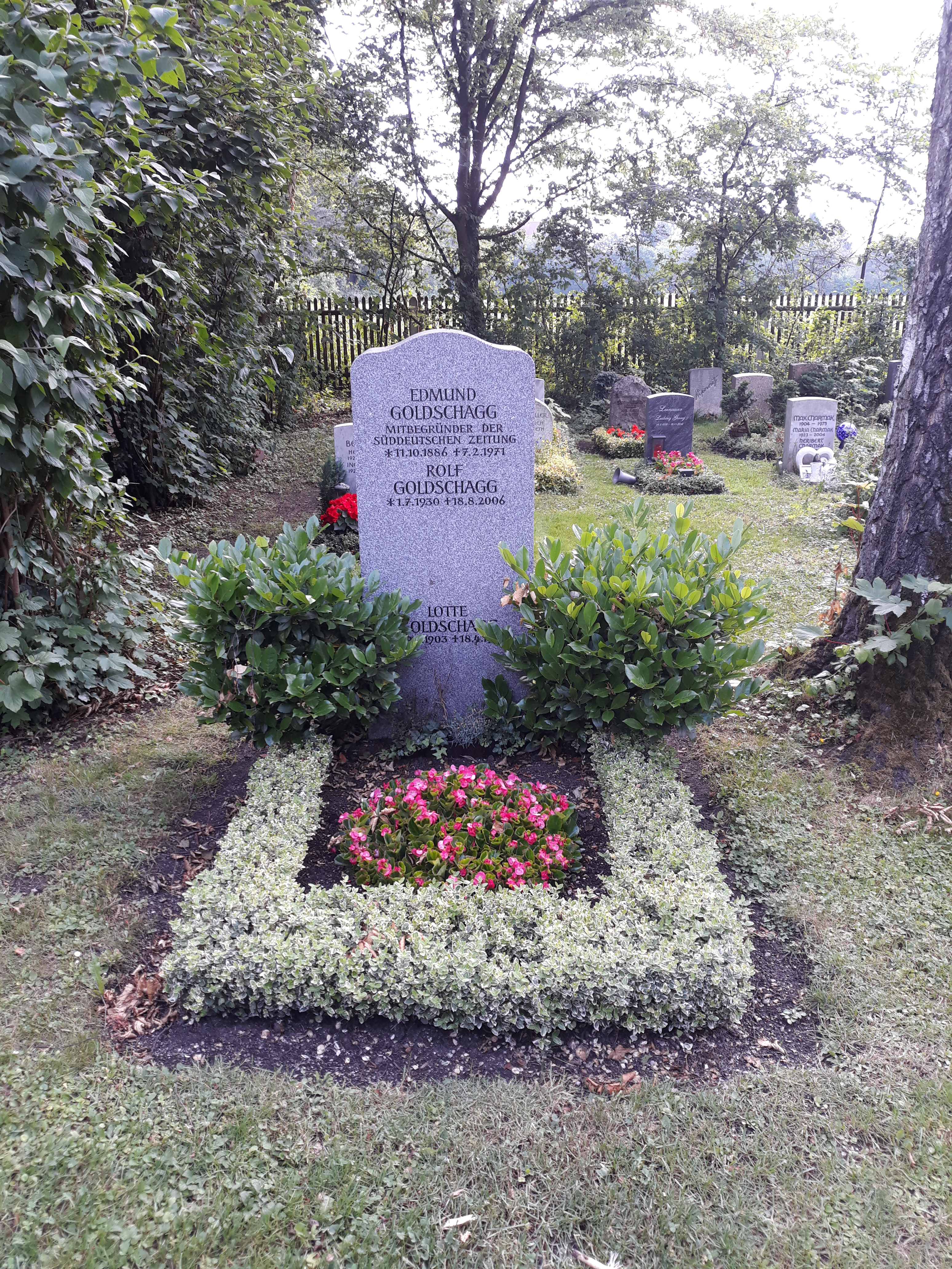 Das Familiengrab des deutschen Journalisten Edmund Goldschagg, München, Friedhof Obermenzing.